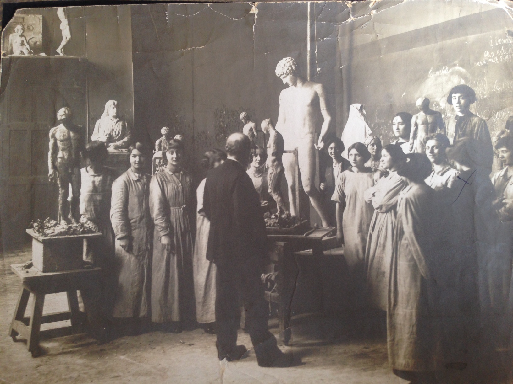 Document exceptionnel montrant l'atelier de Laurent Marqueste, classe de jeunes-filles à l'Ecole des Beaux-Arts de Paris avant la Première Guerre Mondiale. On y voit Raymonde Martin à droite vêtue de sombre, une croix faite à l'encre sur elle. Photographie de la collection Gaston Marie martin.